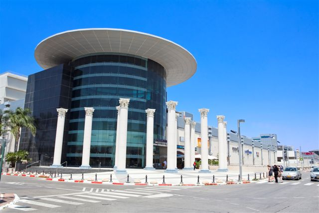 כניסתו האחורית של קניון רננים